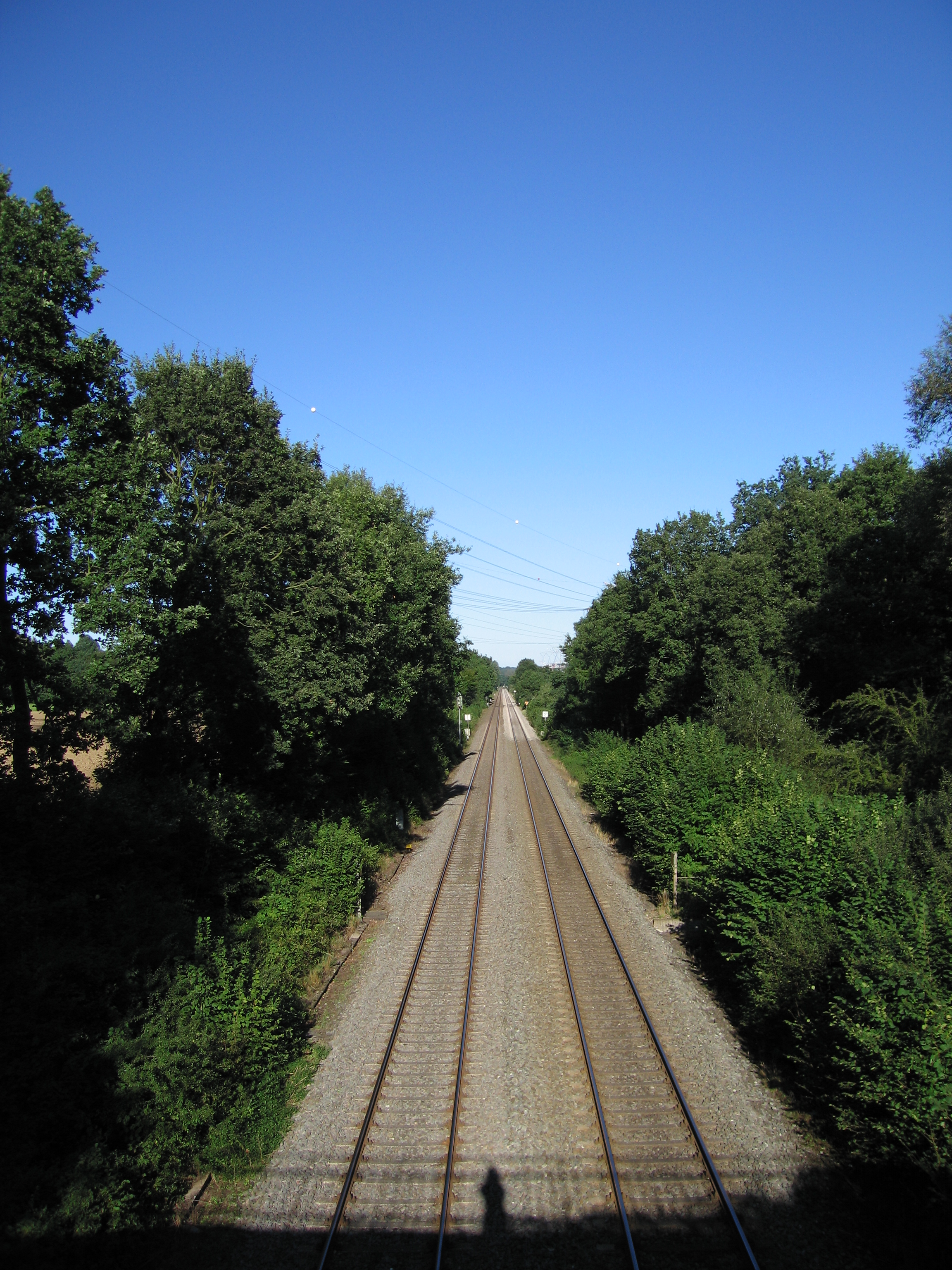 Schienen